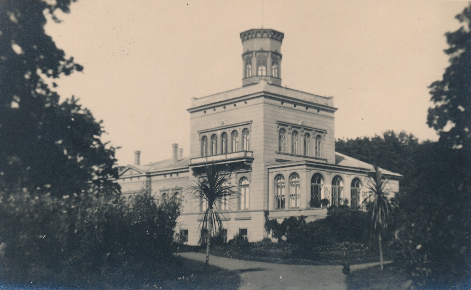 Jõhvi mõisahoone, hävis II maailmasõja ajal.